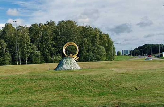 Guldringarna i Timboholmsrondellen, Skövde, Västra Götalands län, Sverige.